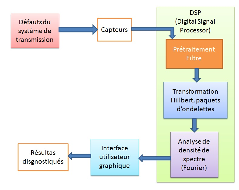 Figure créeé par l'auteur: Schéma pour l'implémentation expérimentale